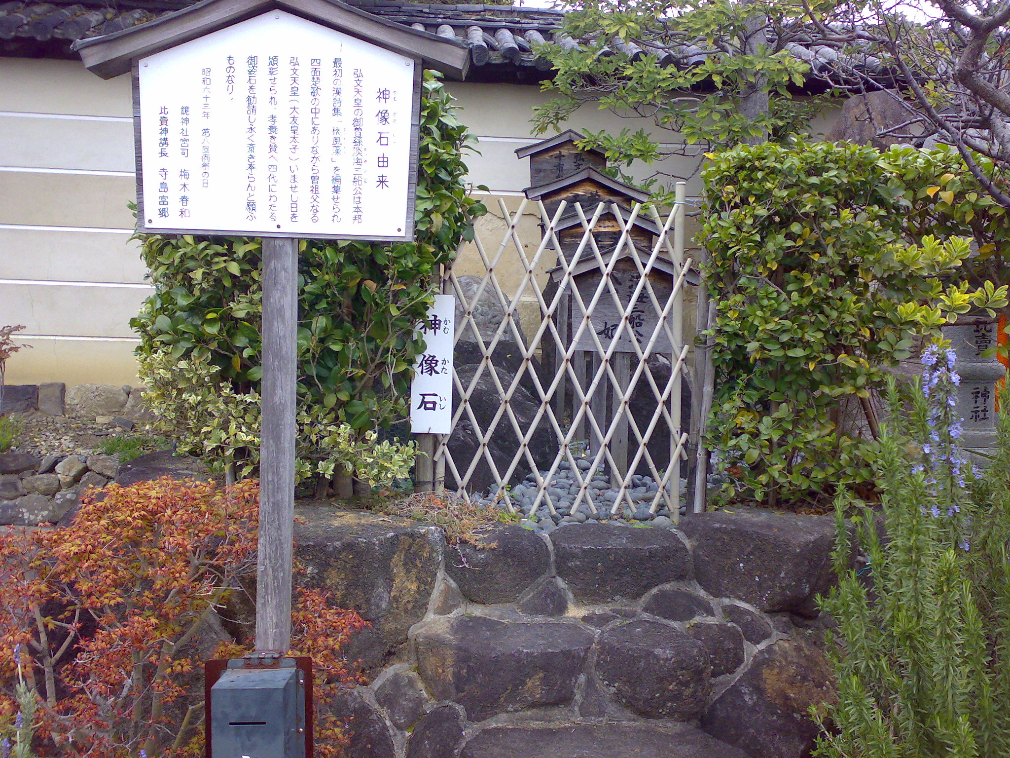 Kamukataishi